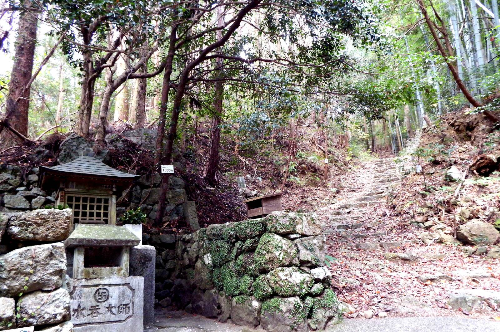 鶴林寺道の水呑み大師